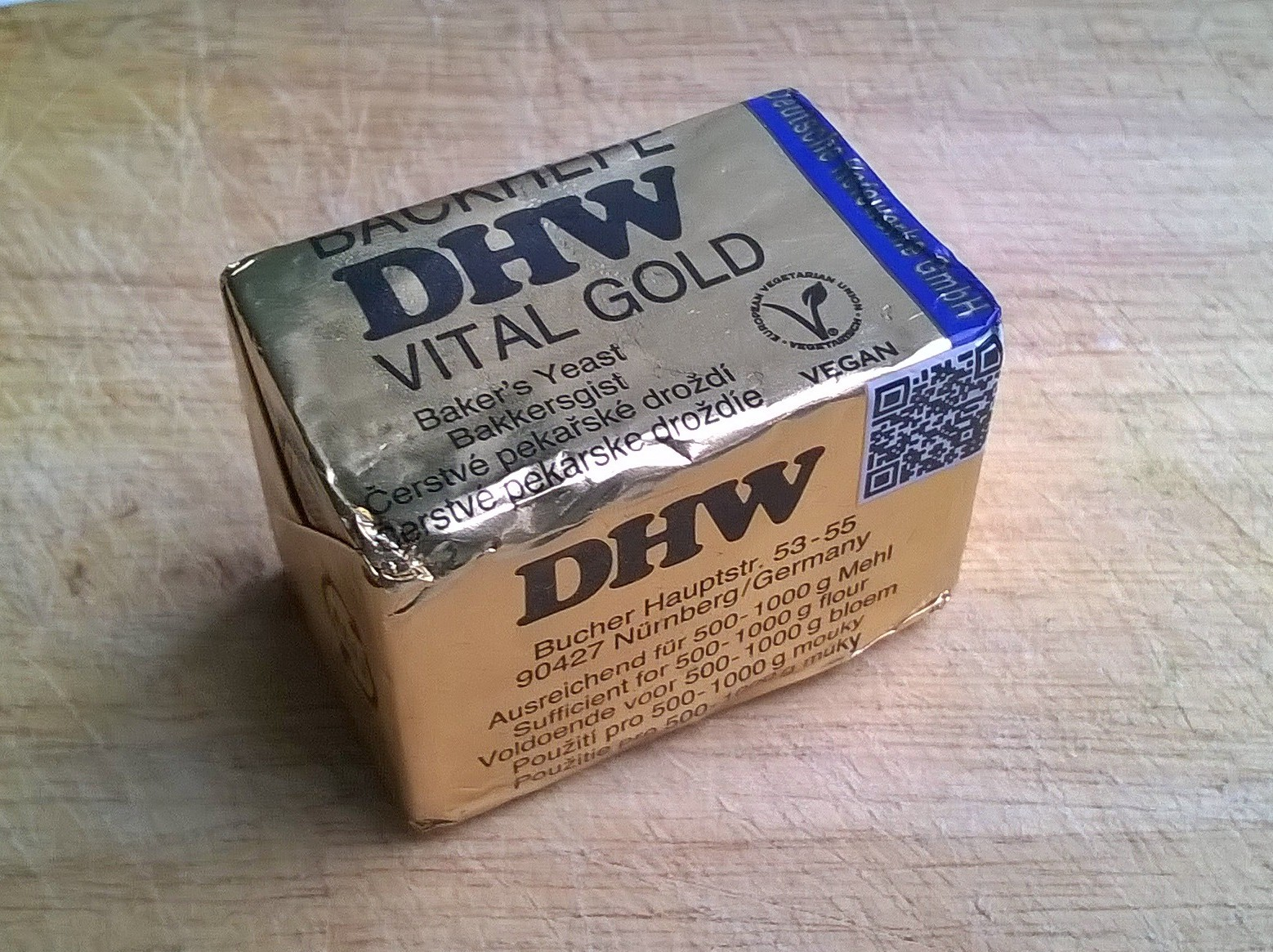 Abgepackte Bäckerhefe, Deutsche Hefewerke Nürnberg